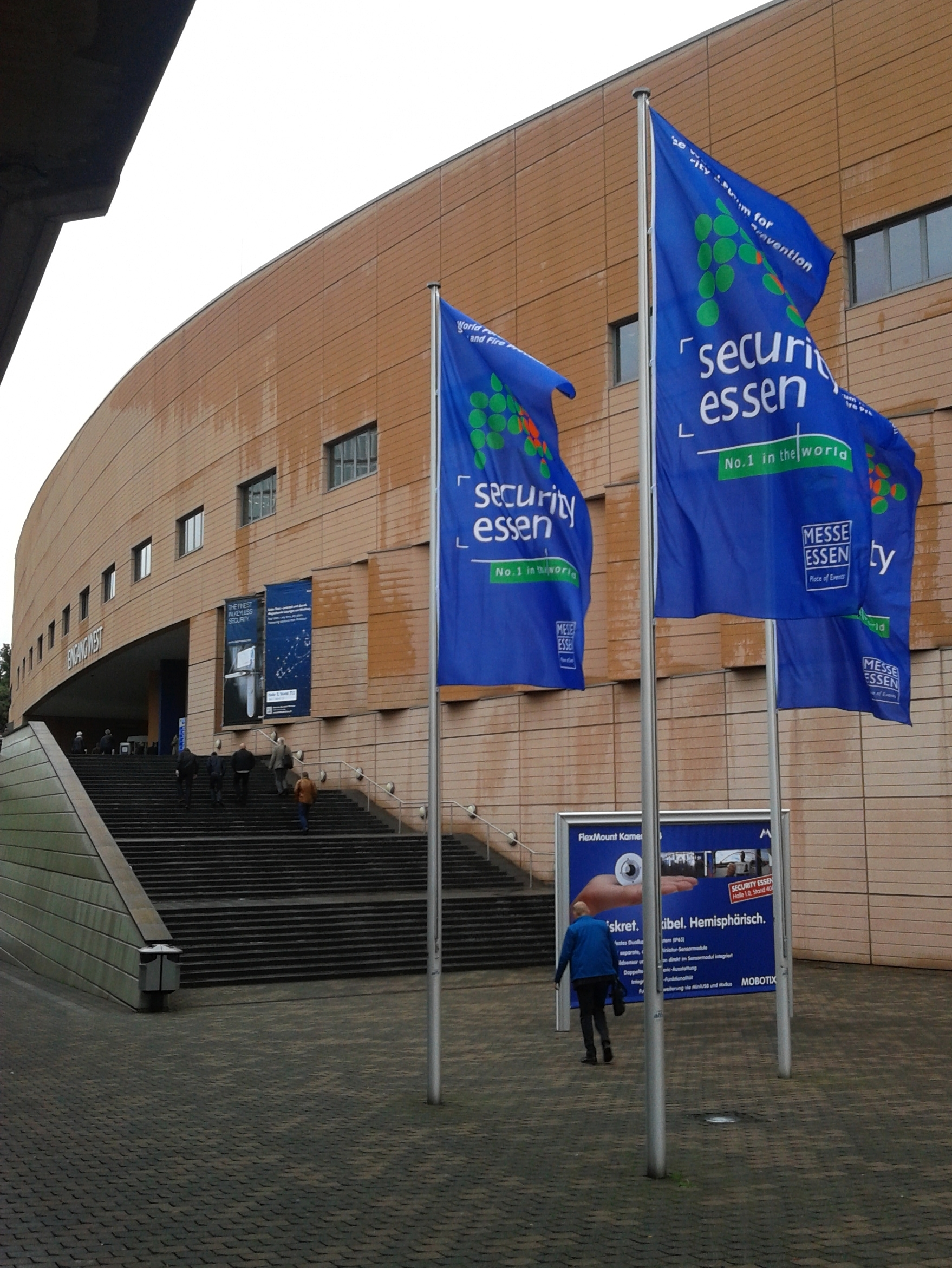 Messe in Essen, Eingang West, Security 2012, Germany.